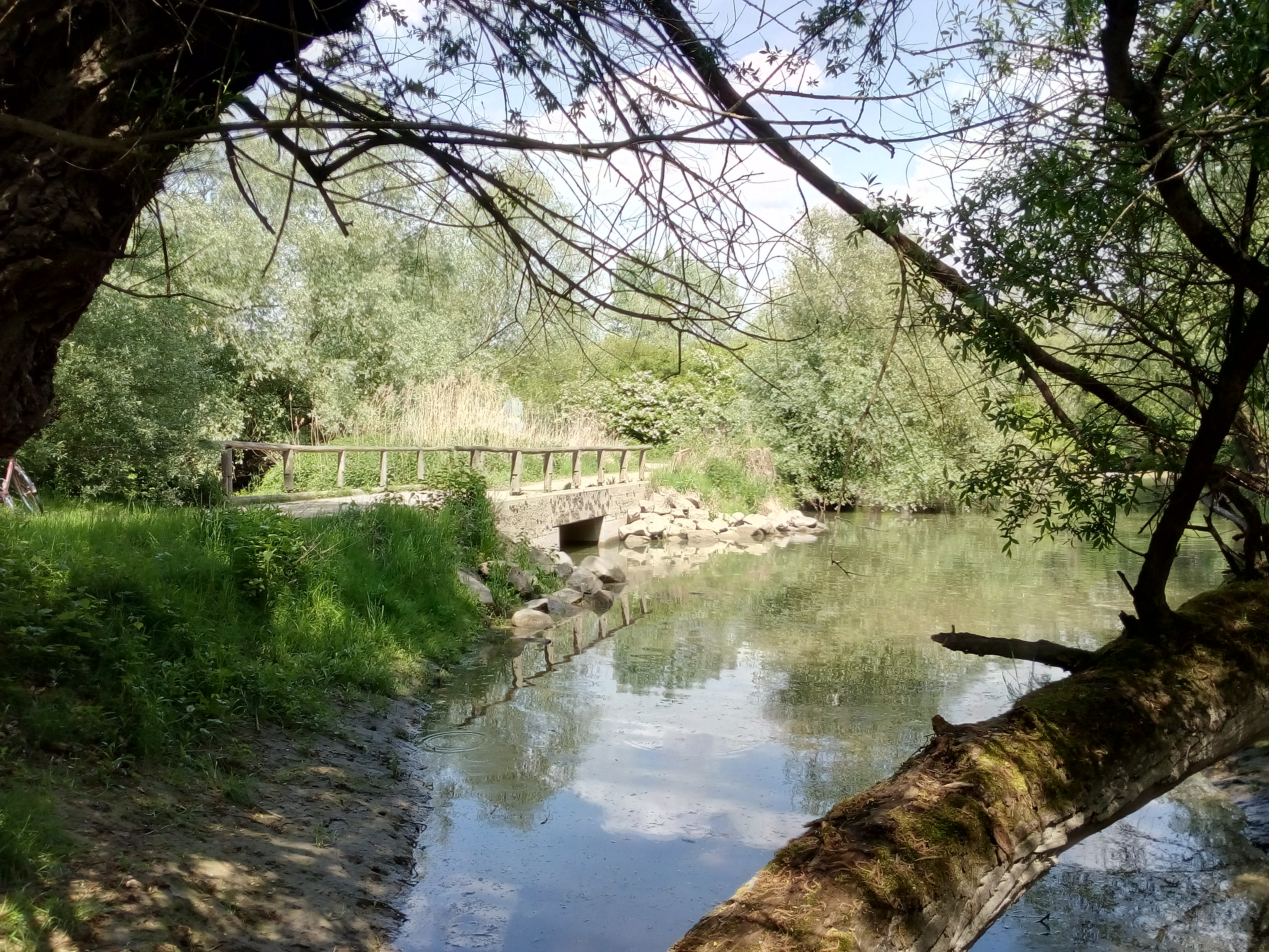 Wörth am Rhein, Naturschutzgebiet Goldgrund, Pforzer Altrhein (auch dem Hagenbacher Altrhein zugerechnet)